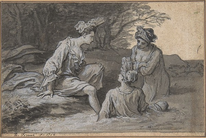 Trois femmes conversant au bain dans une rivière ; vêtues de longues chemises blanches, l'une est assise sur la berge, une autre est accoudée dans l'eau, la dernière, poitrine dénudée, a les pieds dans l'eau et semble être appuyée sur un talus ou un rocher.